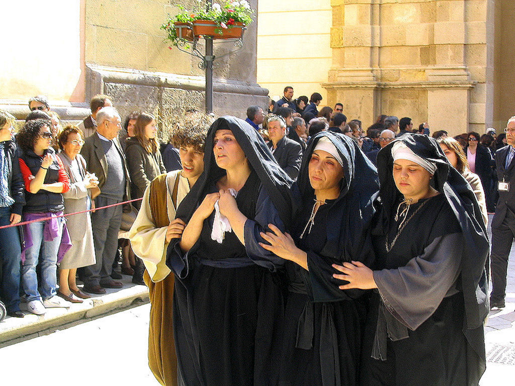 Giovedì Santo - Processione vivente di Marsala